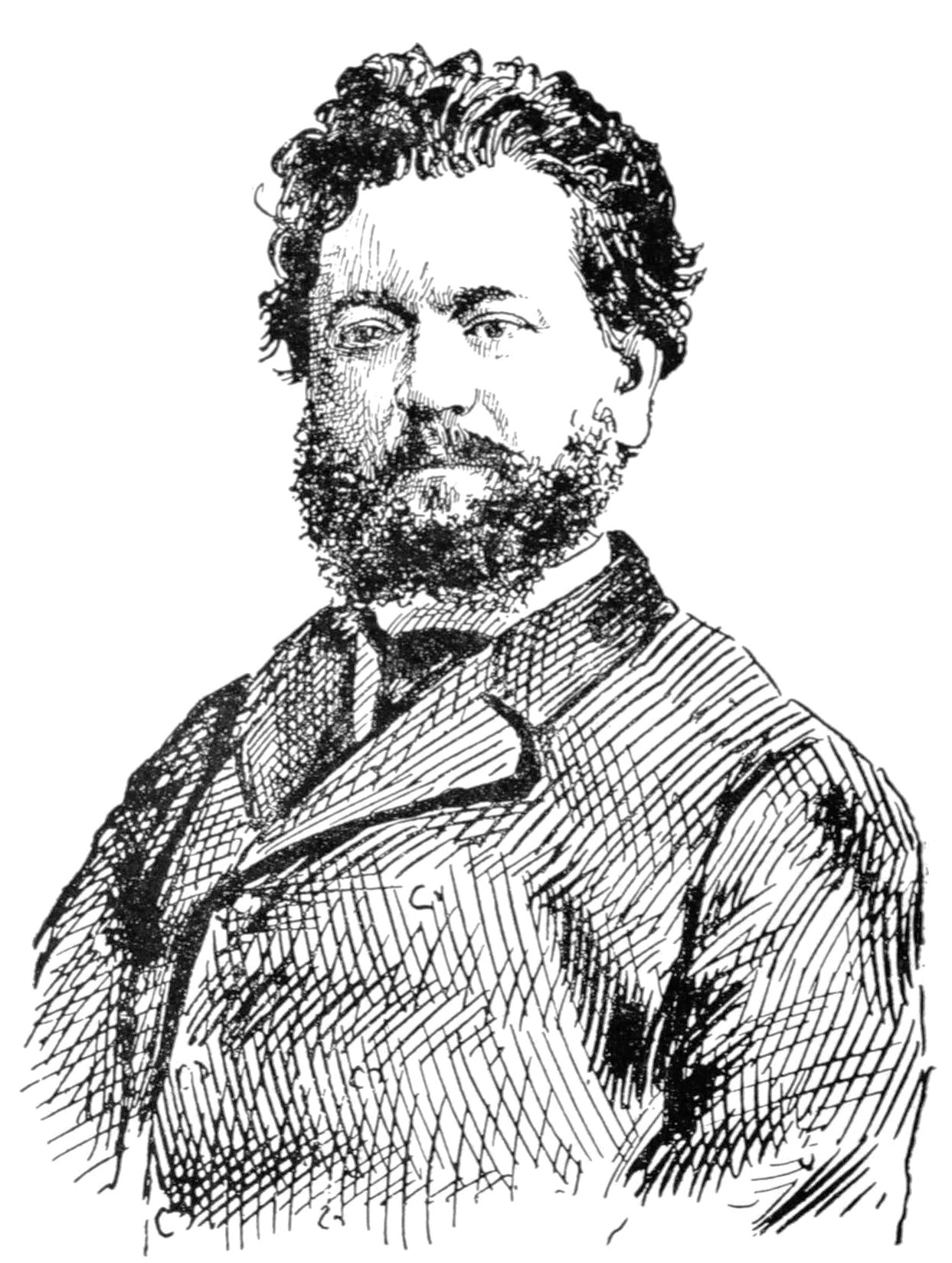 "Gabriel, ancien député de Nancy".